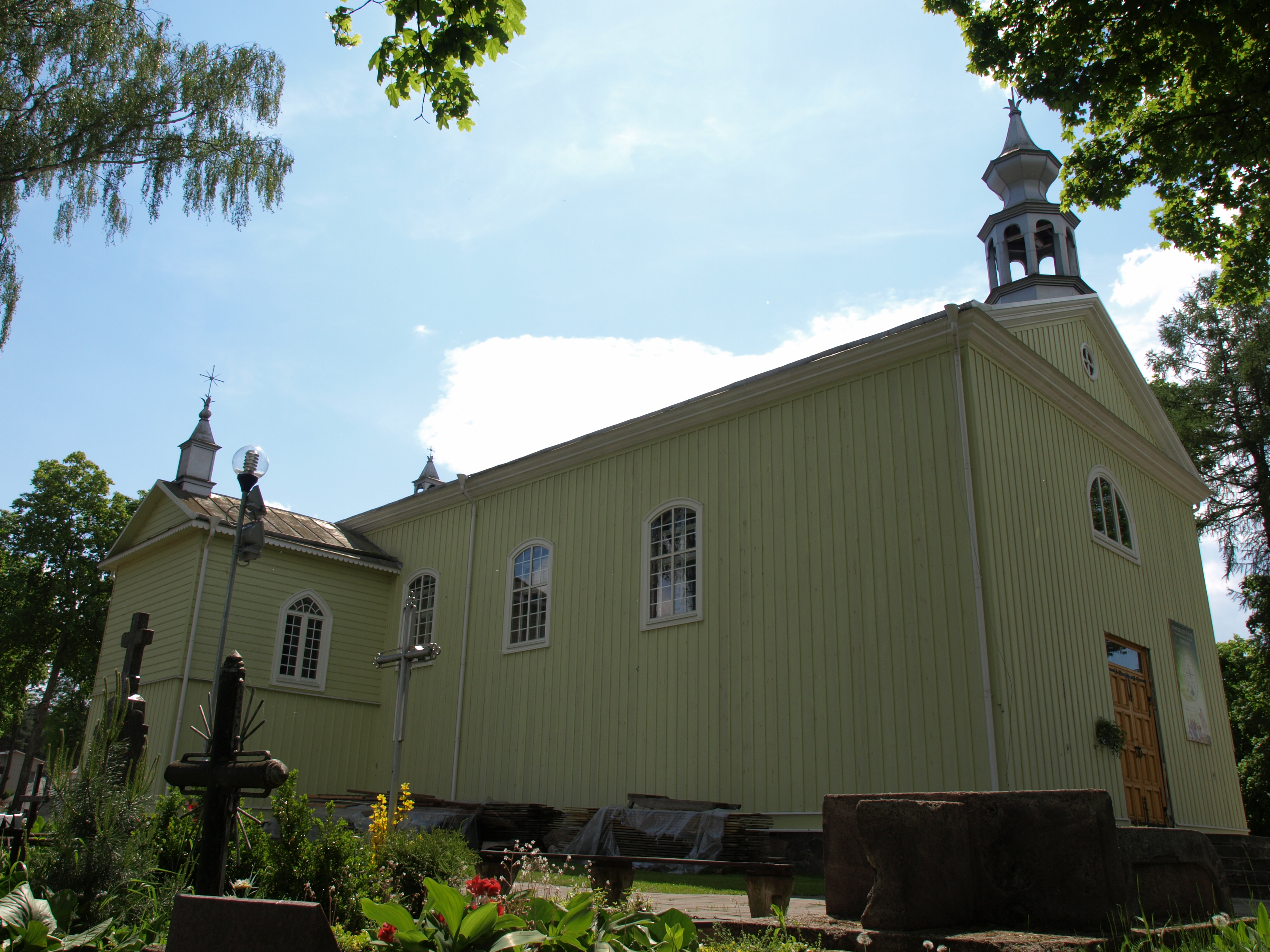 Alytaus šv. Angelų Sargų bažnyčia, Alytus, Lietuva